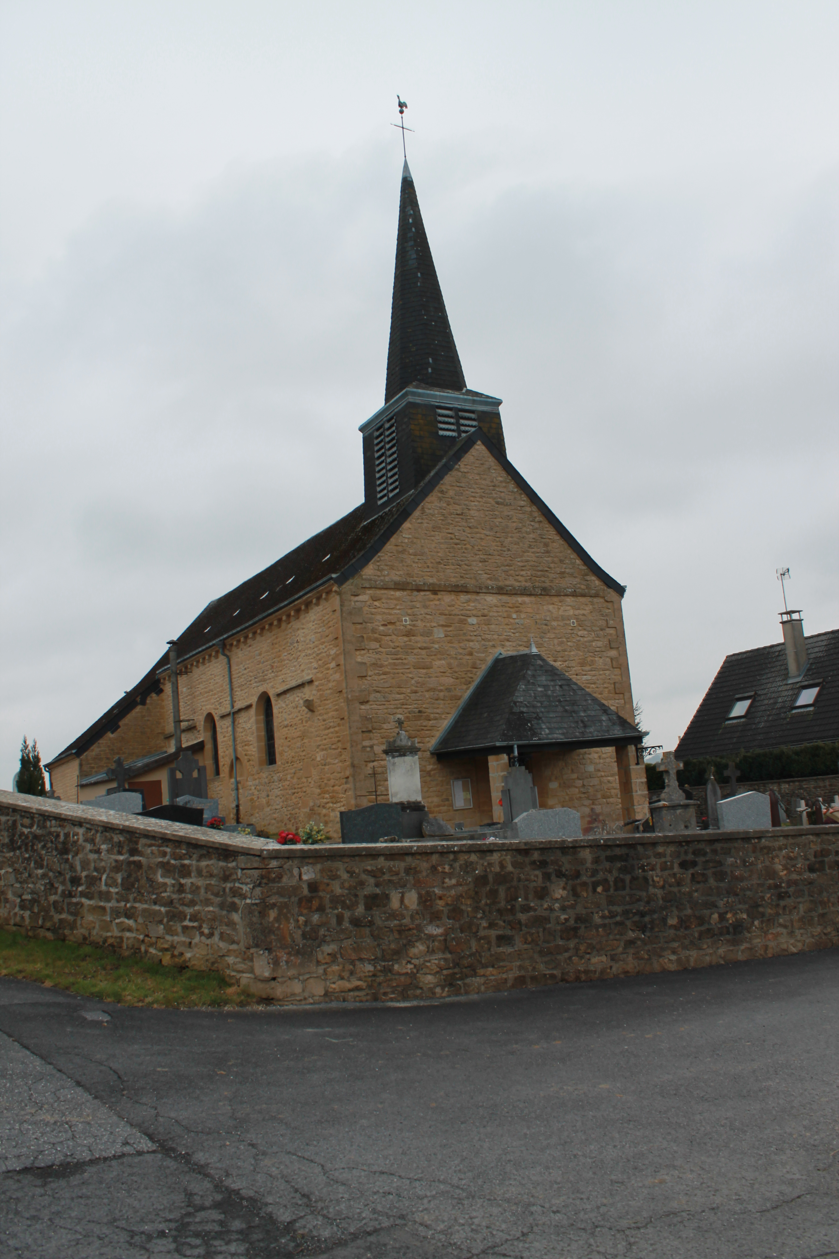 Eglise de Vrigne-Meuse.